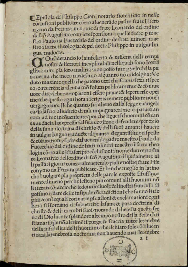 Contro alle conclusioni publicate contro a frate Hieronymo Savonarola. - [Firenze] : [Lorenzo Morgiani], [dopo l'aprile 1497]. - 8 c. ; a⁸ ; 4° .